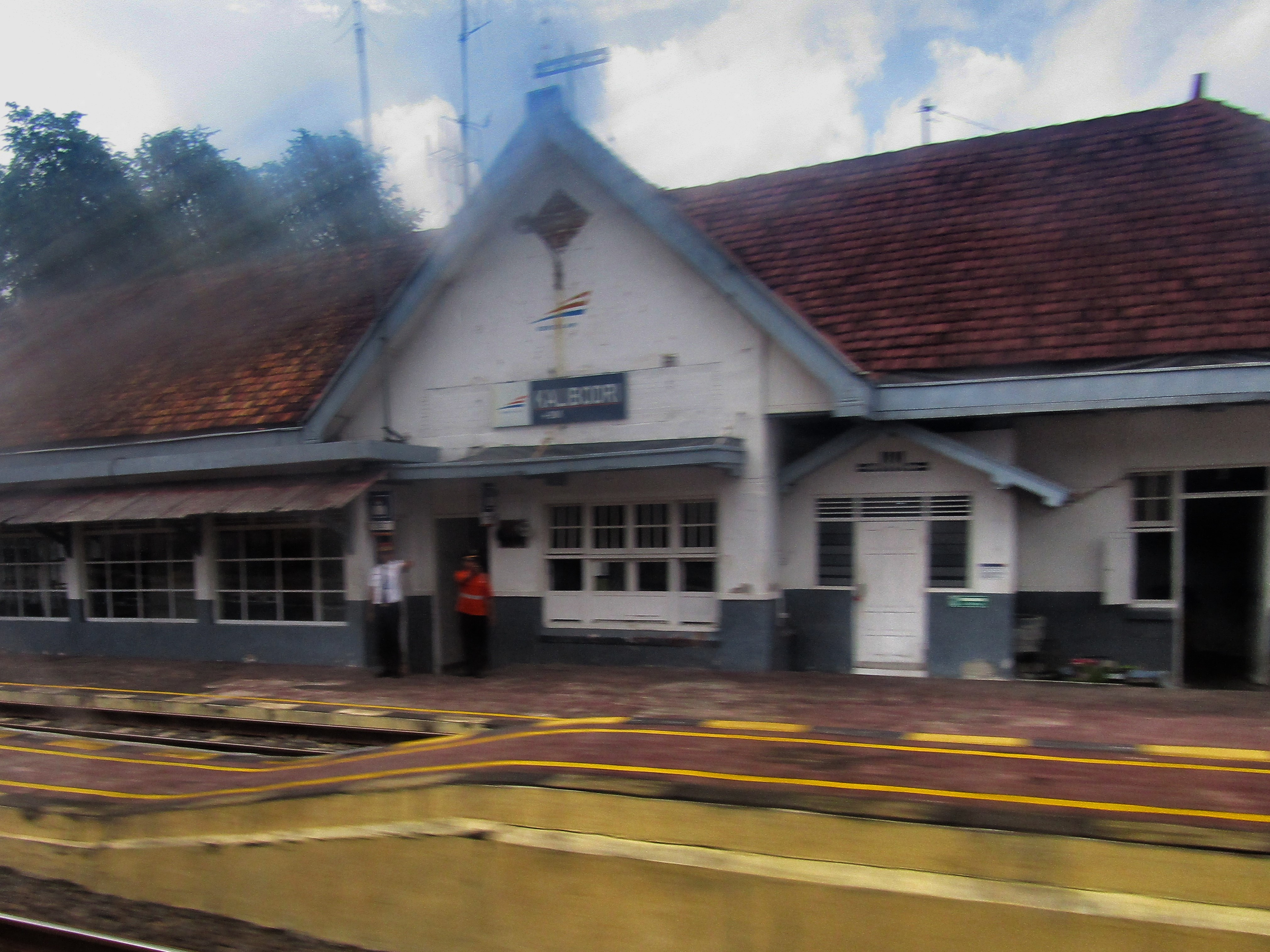 Tampak peron Stasiun Kalibodri, 2019